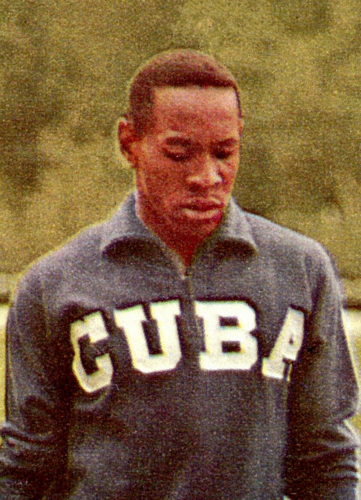 CAMPIONI DELLO SPORT 1967/68 Figurina/Sticker -n. 50 - E. FIGUEROLA